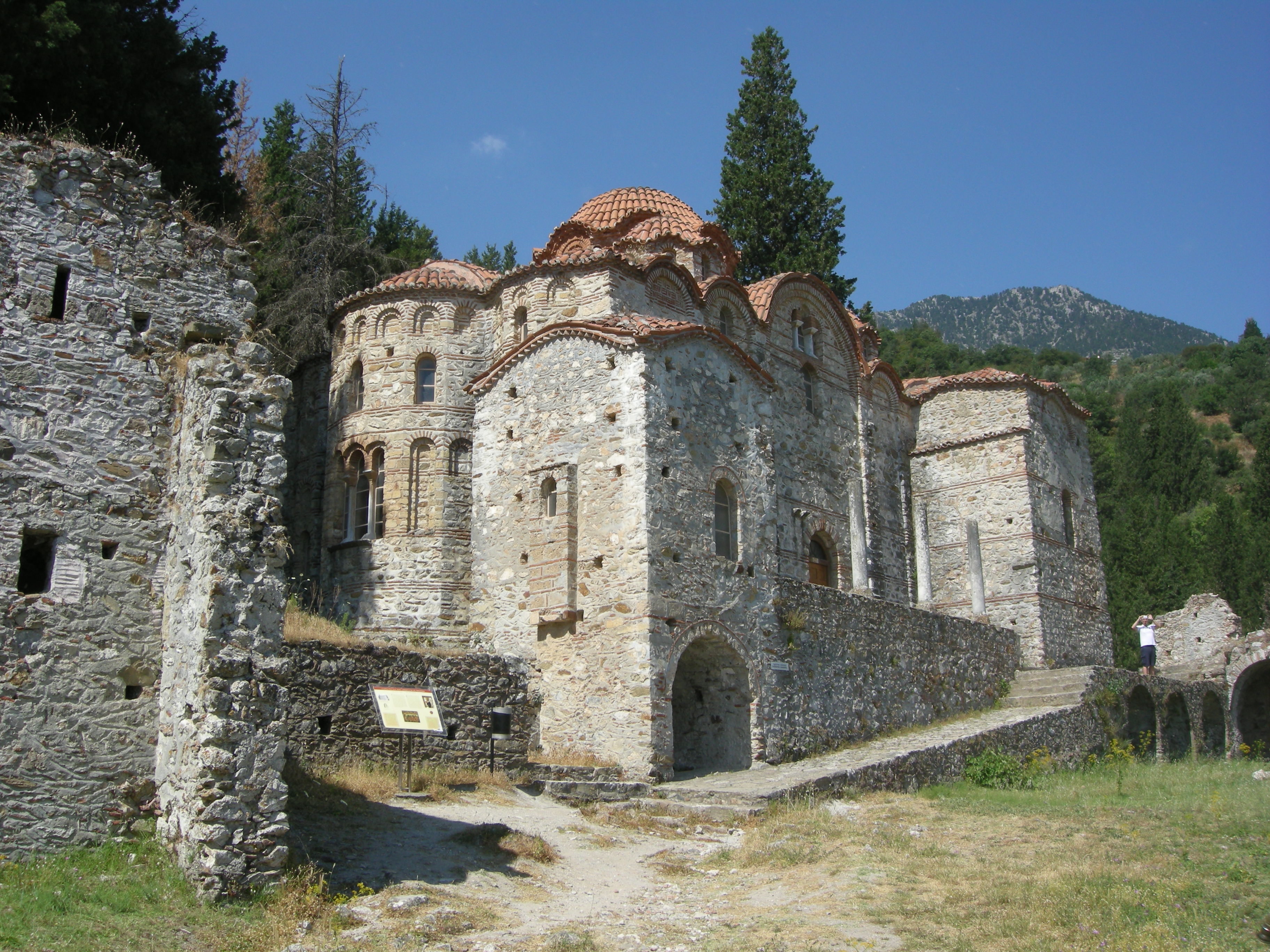 Mystras, hodigitria